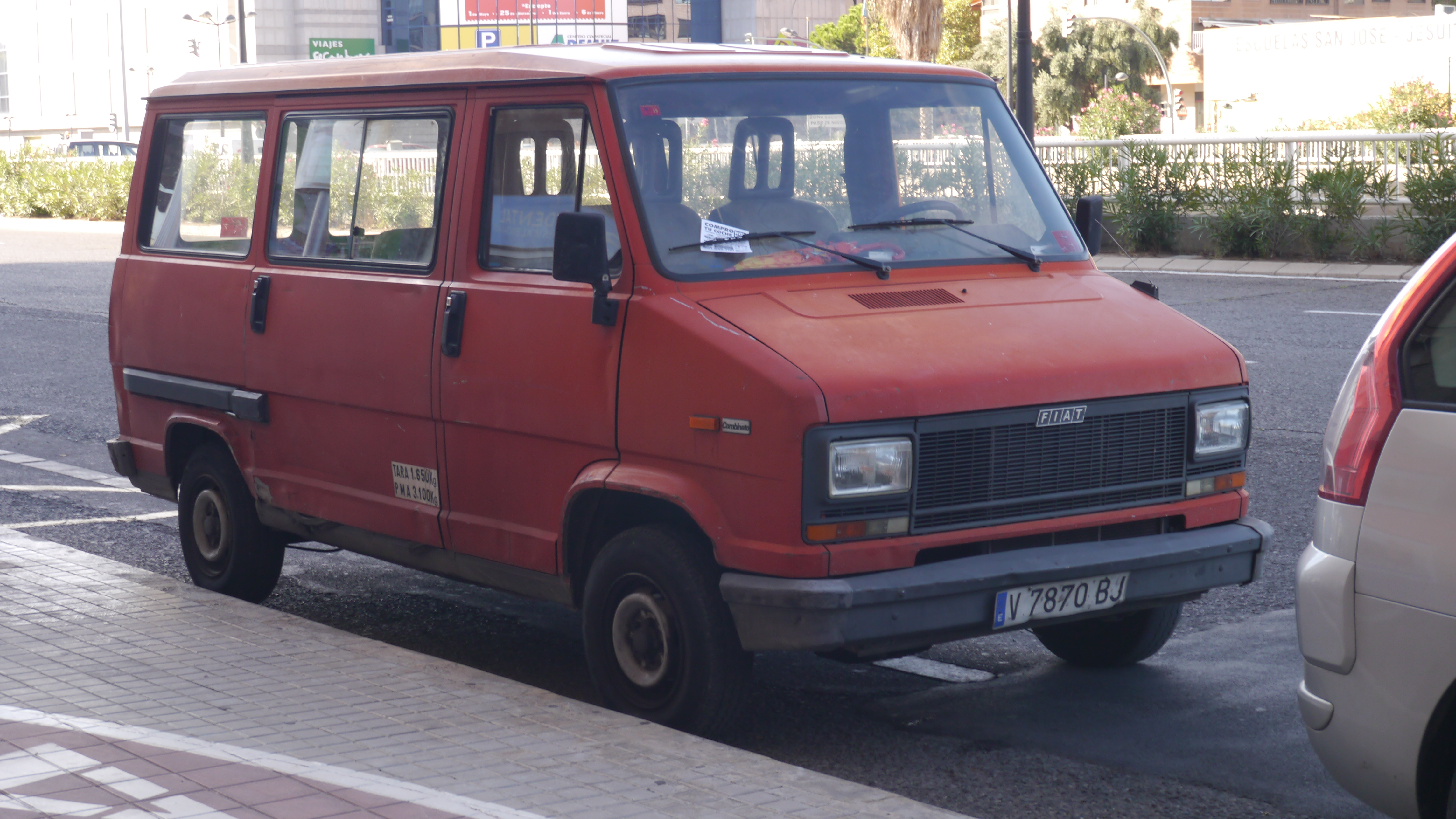 Valencia, Spain.